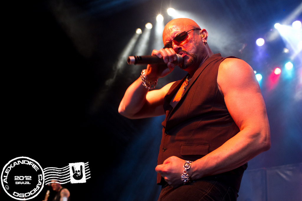 Queensrÿche ao vivo no HSBC Brasil - 14/04/2012 - São Paulo, Brasil